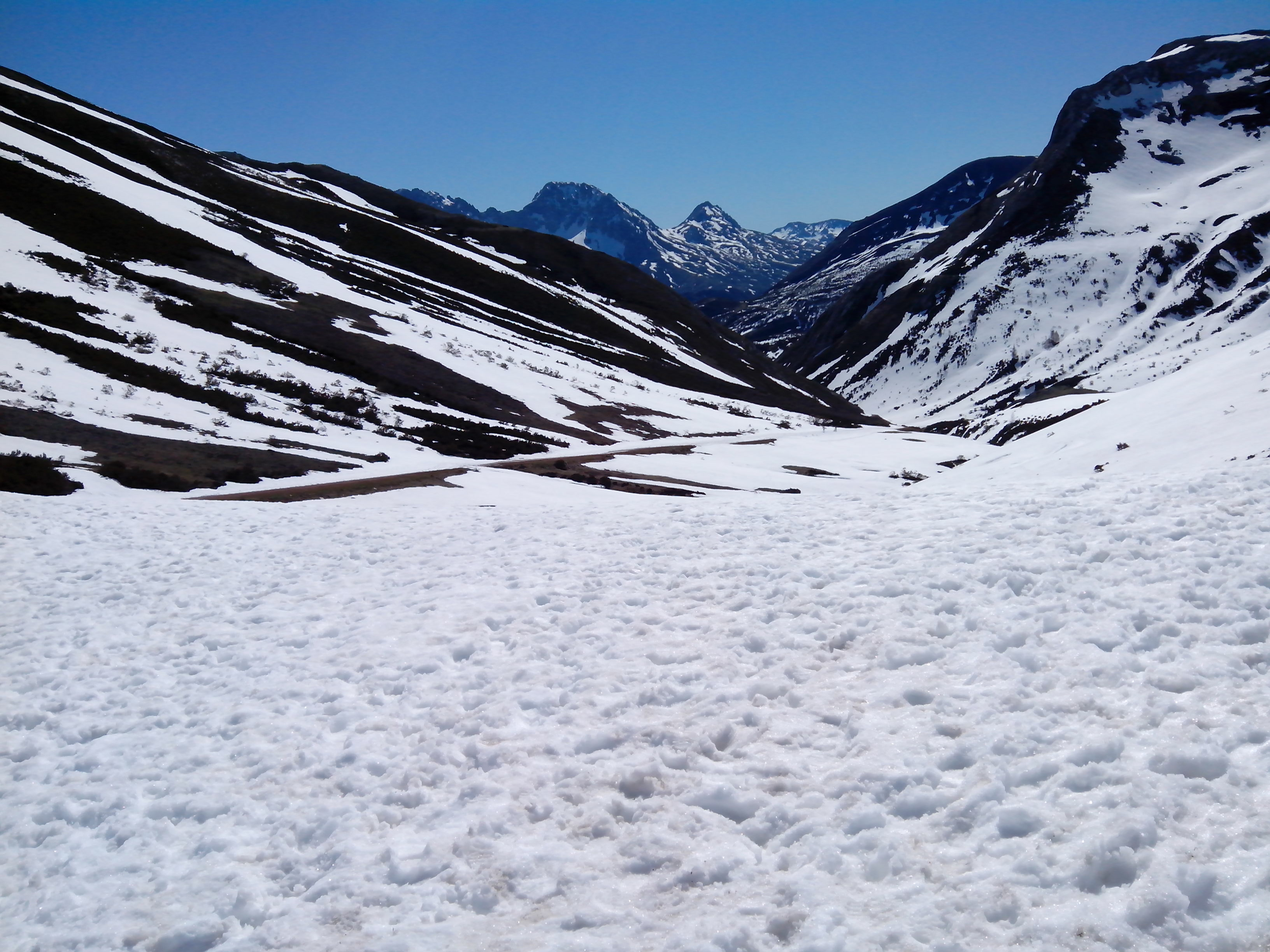 Alto de la Farrapona, en el límite entre León y Asturias. This is a photography of a Special Area of Conservation in Spain with the ID: ES0000054. Natura2000 entry, EEA entry